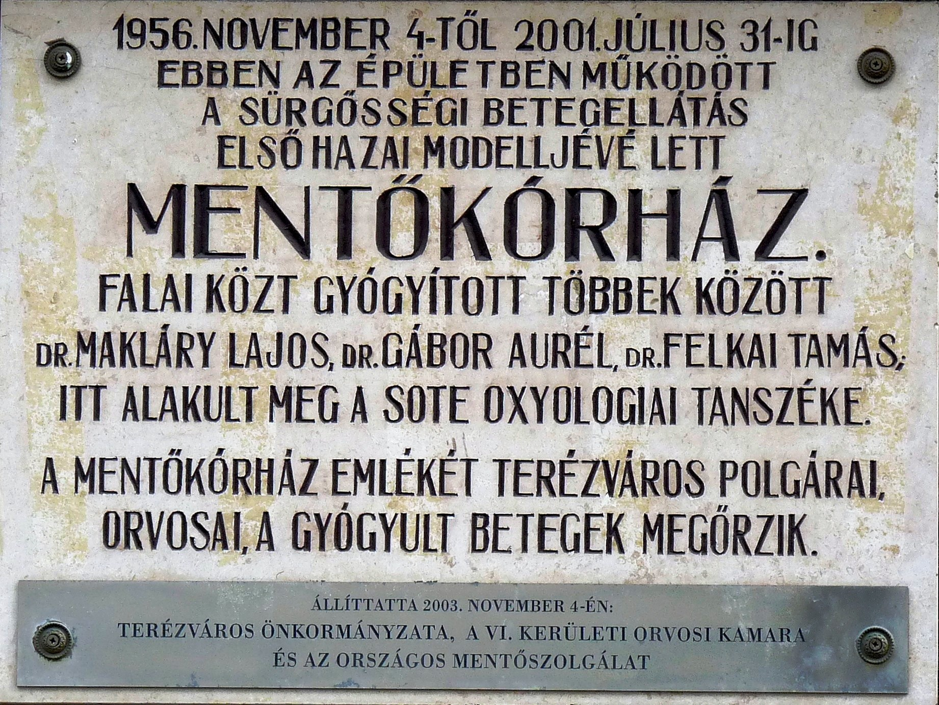 Az egykori Mentőkórház (OMSZ Kórháza), valamint a magyar mentés története legmeghatározóbb alakjainak (dr. Makláry Lajos, dr. Gábor Aurél és dr. Felkai Tamás), továbbá az ott megalakult SOTE Oxyologiai tanszék emléktáblája. Budapest, VI. ker. Szobi utca 3.